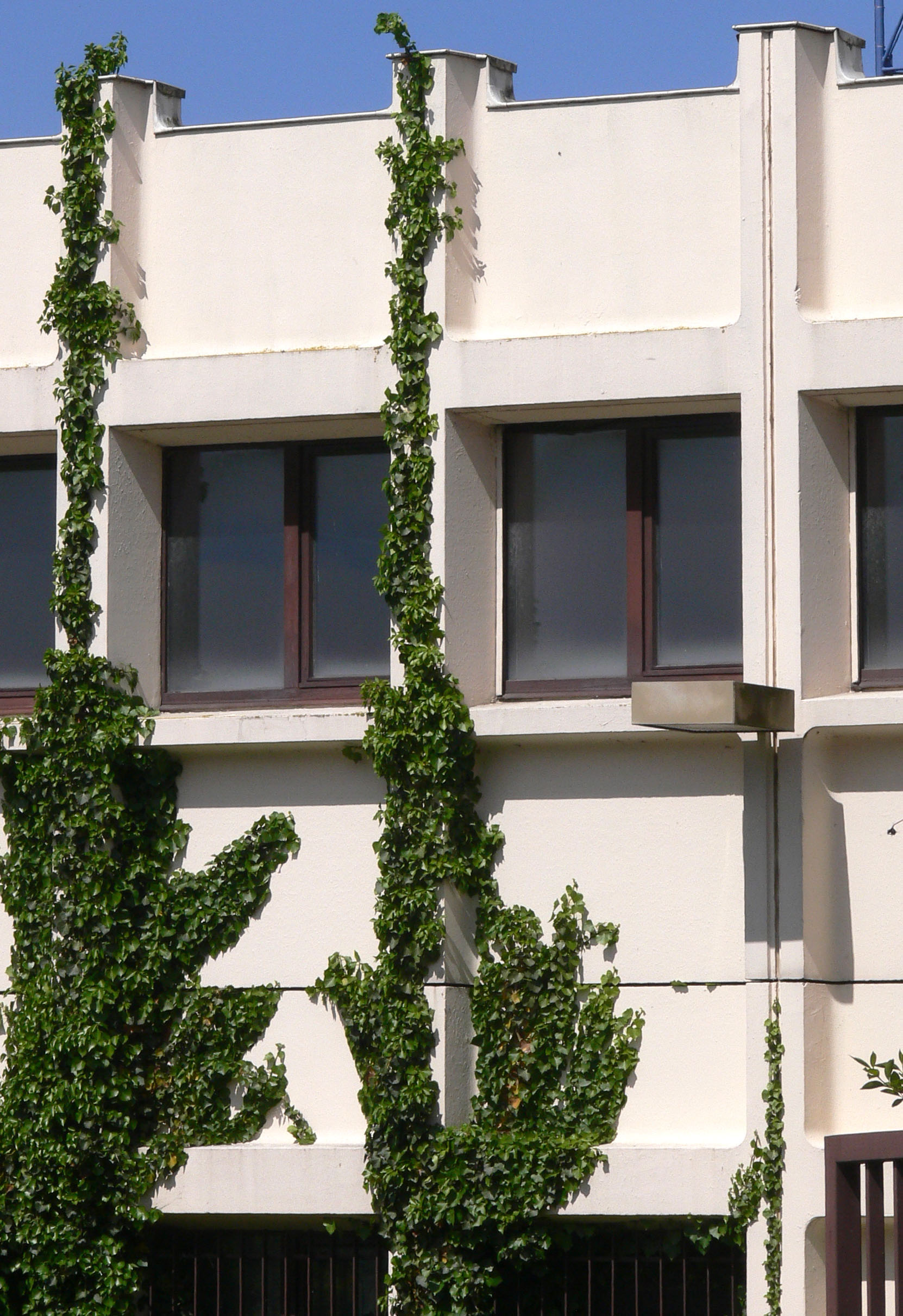 hedera helix, lierre. Il est possible de" guider" le lierre en utilisant le fait qu'il pousse préférentiellement dans une fente verticale, quand elle est bien éclairée et qu'il en a la possibilité. Ce phénomène est aussi observé avec certains poteaux métalliques (de support de clôtures) de" section en u"Unknown hedera helix, ivy. it is possible to "guide" the ivy using the fact that it grows preferentially in a vertical slot when it is well lit and that he has the opportunity. this phenomenon is also observed with some metal poles (fence support) with "u section"